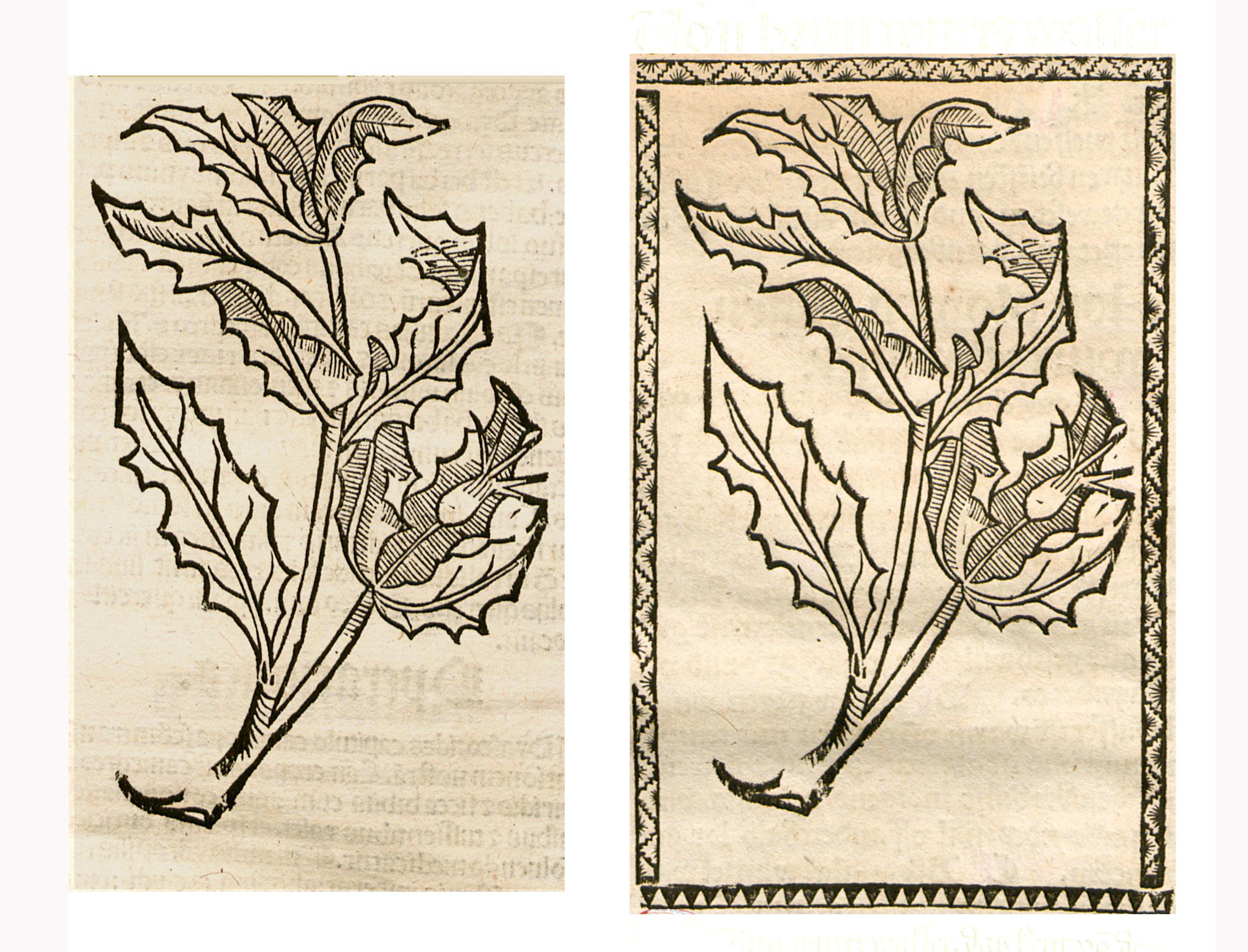 Abbildung von: Braunwurz